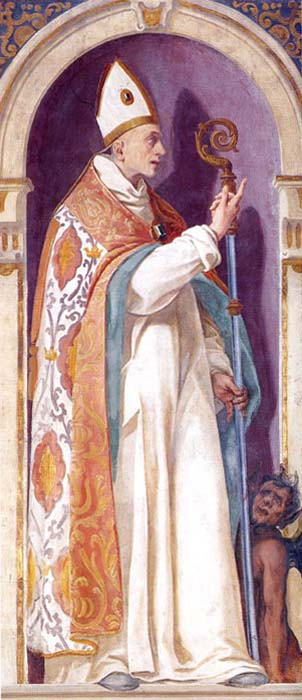 Saint Étienne de Châtillon (1155-1208) chartreux, évêque de Die. Fêté le 7 septembre.